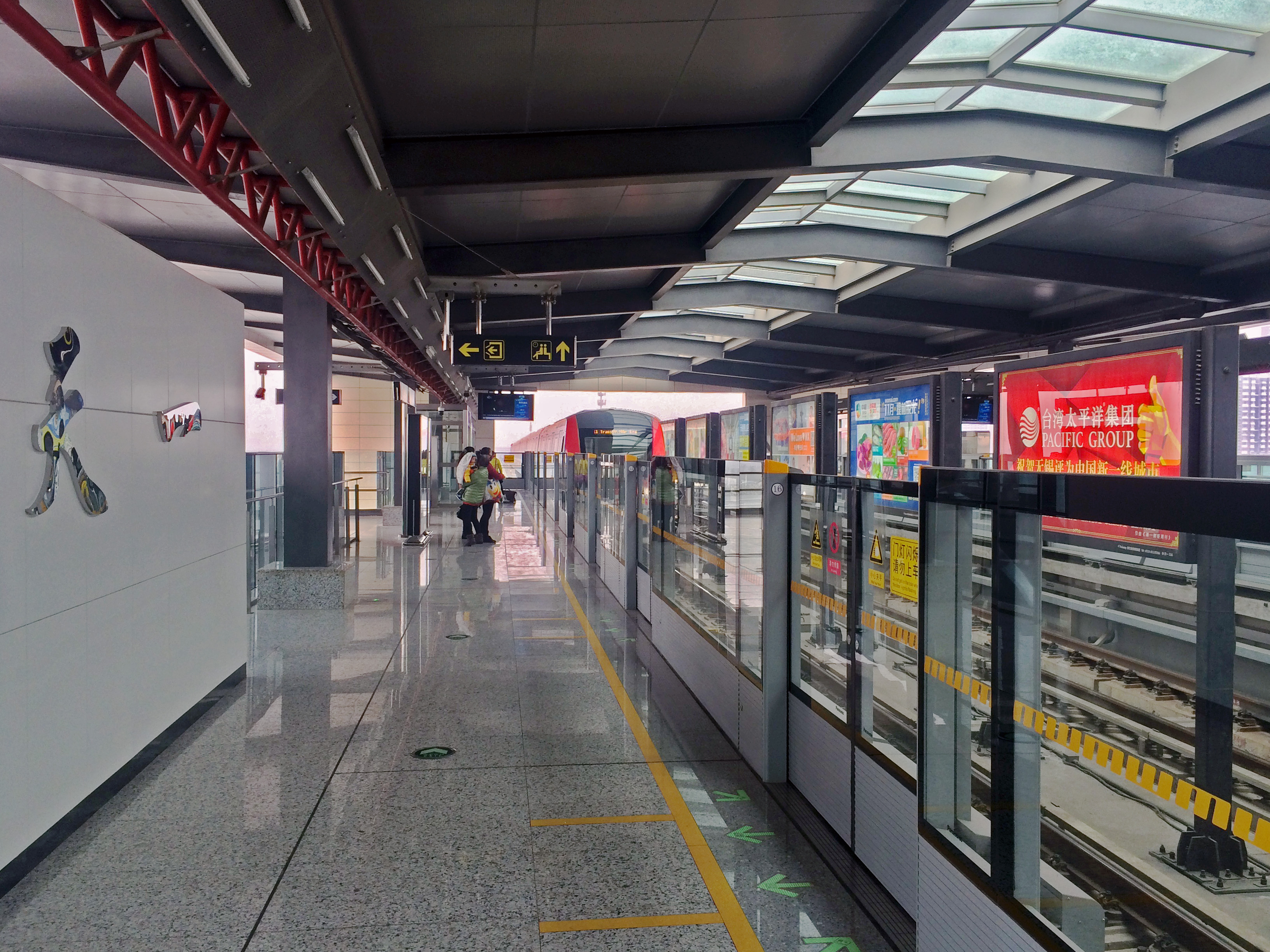 無錫地鐵1號線天一站站臺